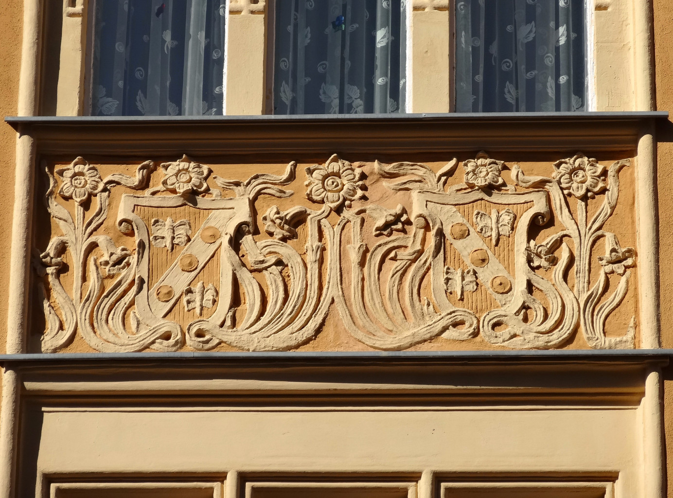 Kamienica ul. Cieszkowskiego 8 w Bydgoszczy (1899-1900, Józef Święcicki)